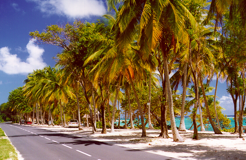 Plage de Capesterre, Marie-Galante